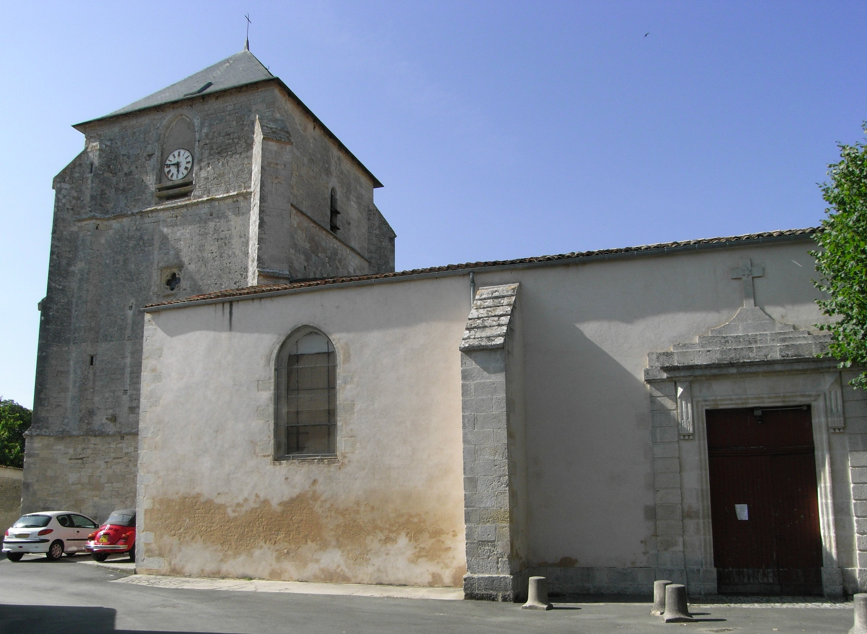 Église Sainte-Madeleine à La Jarrie (vue sud), commune de Charente-Maritime (17) en France.